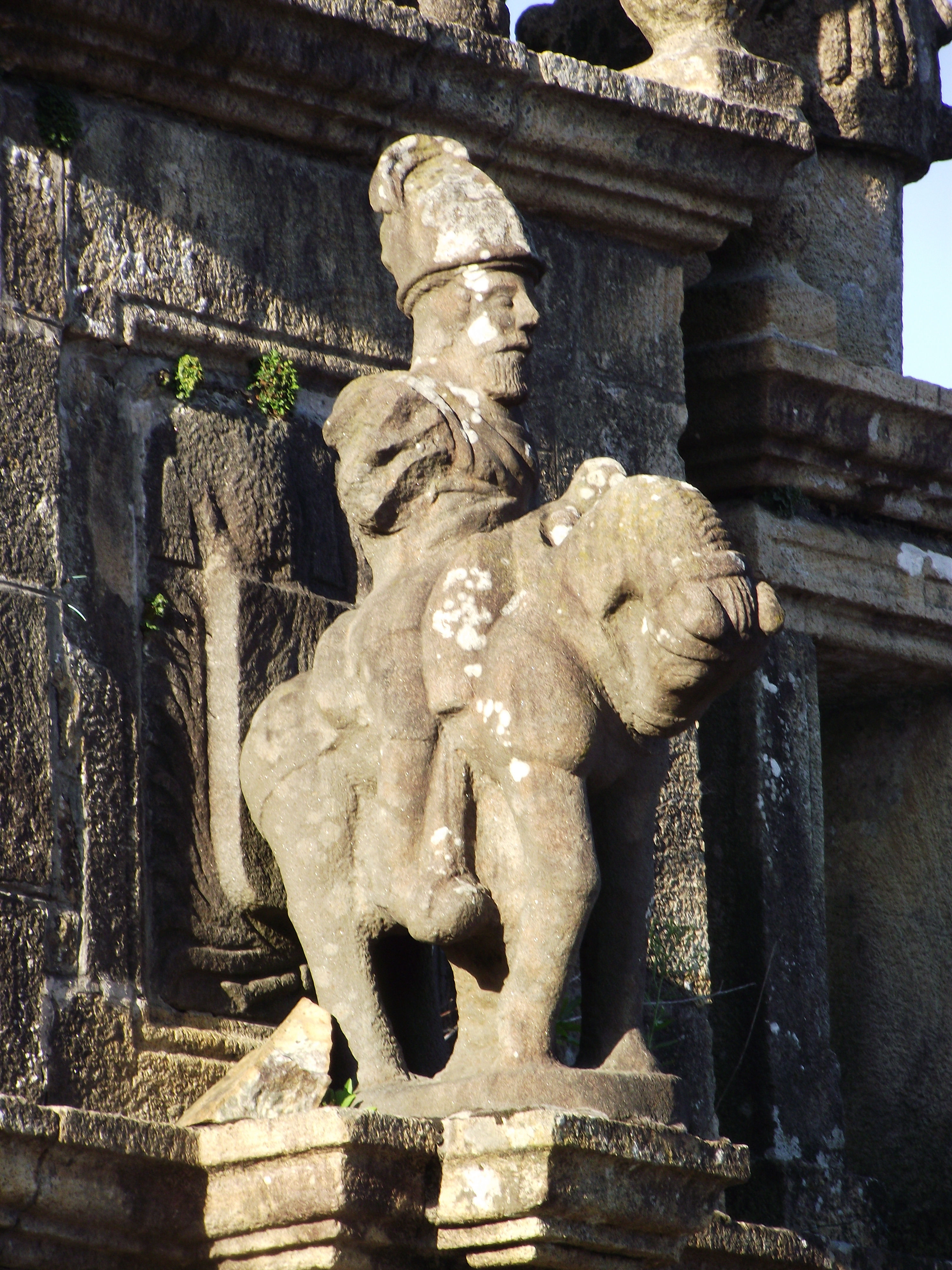 Gralon war e varc'h e toull porzh iliz Argol (Bro-Gerne)